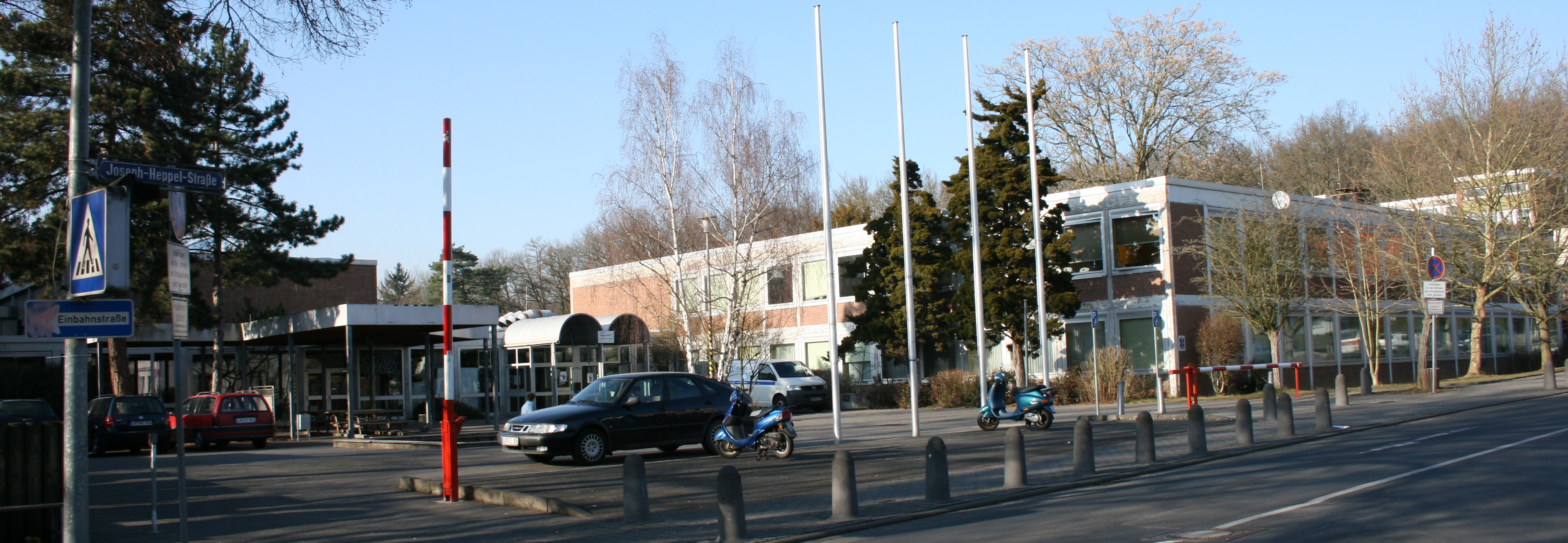 Tilemannschule, Limburg an der Lahn, Deutschland